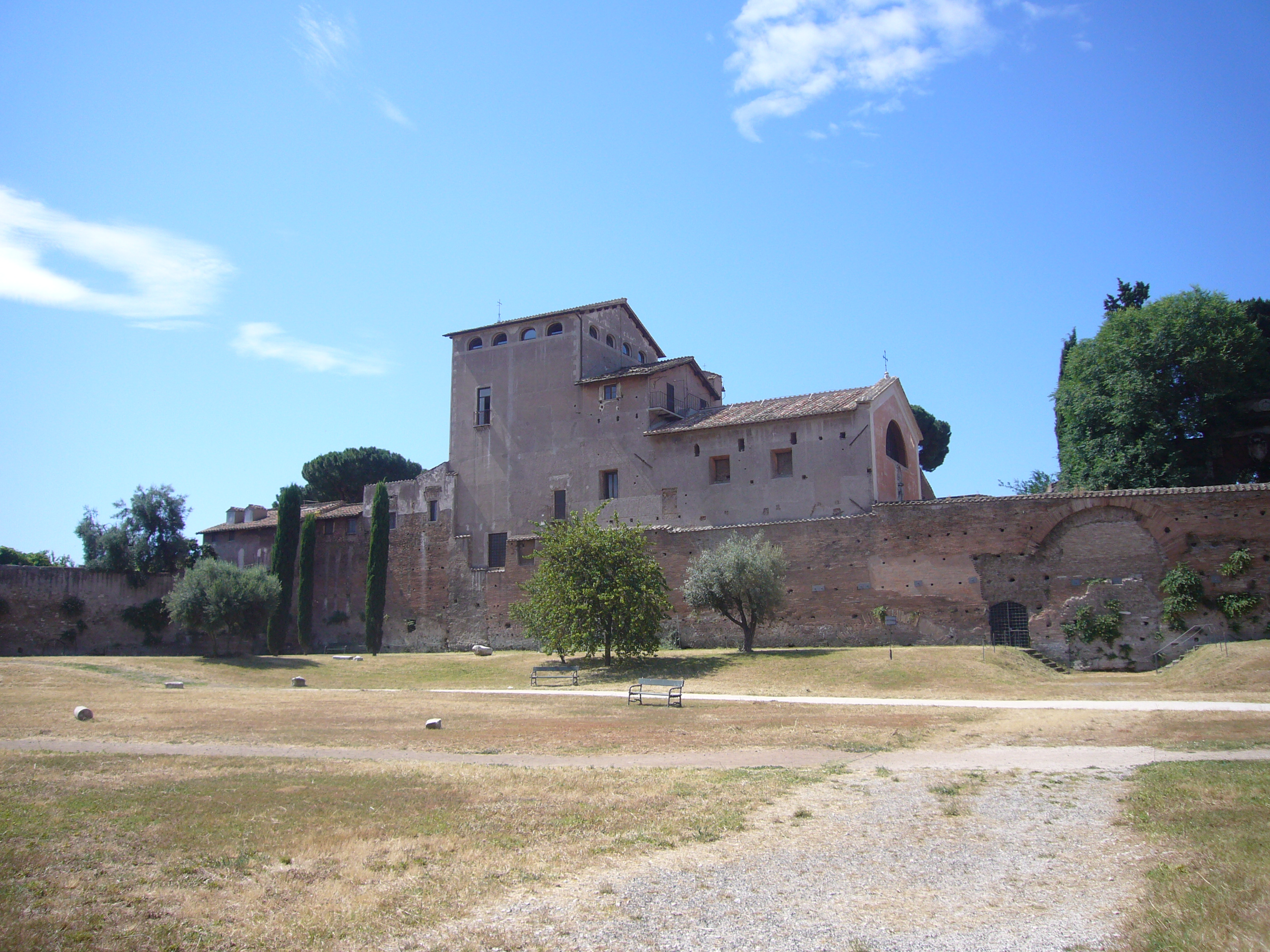 Roma, Palatino. Vigna Barberini e s. Sebastiano al Palatino